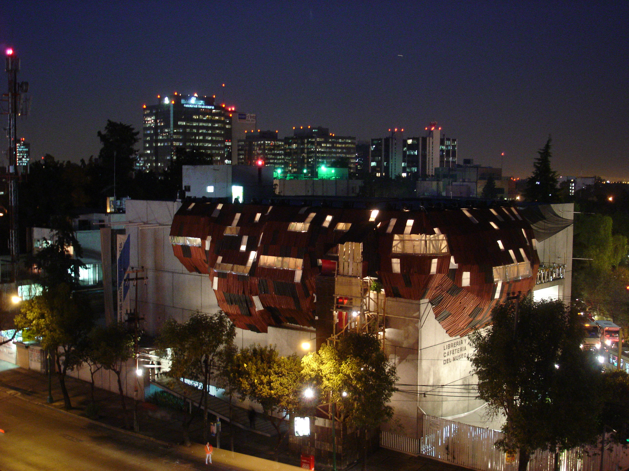 Intervention at the Carrillo's Gil Museum facade Mexico City